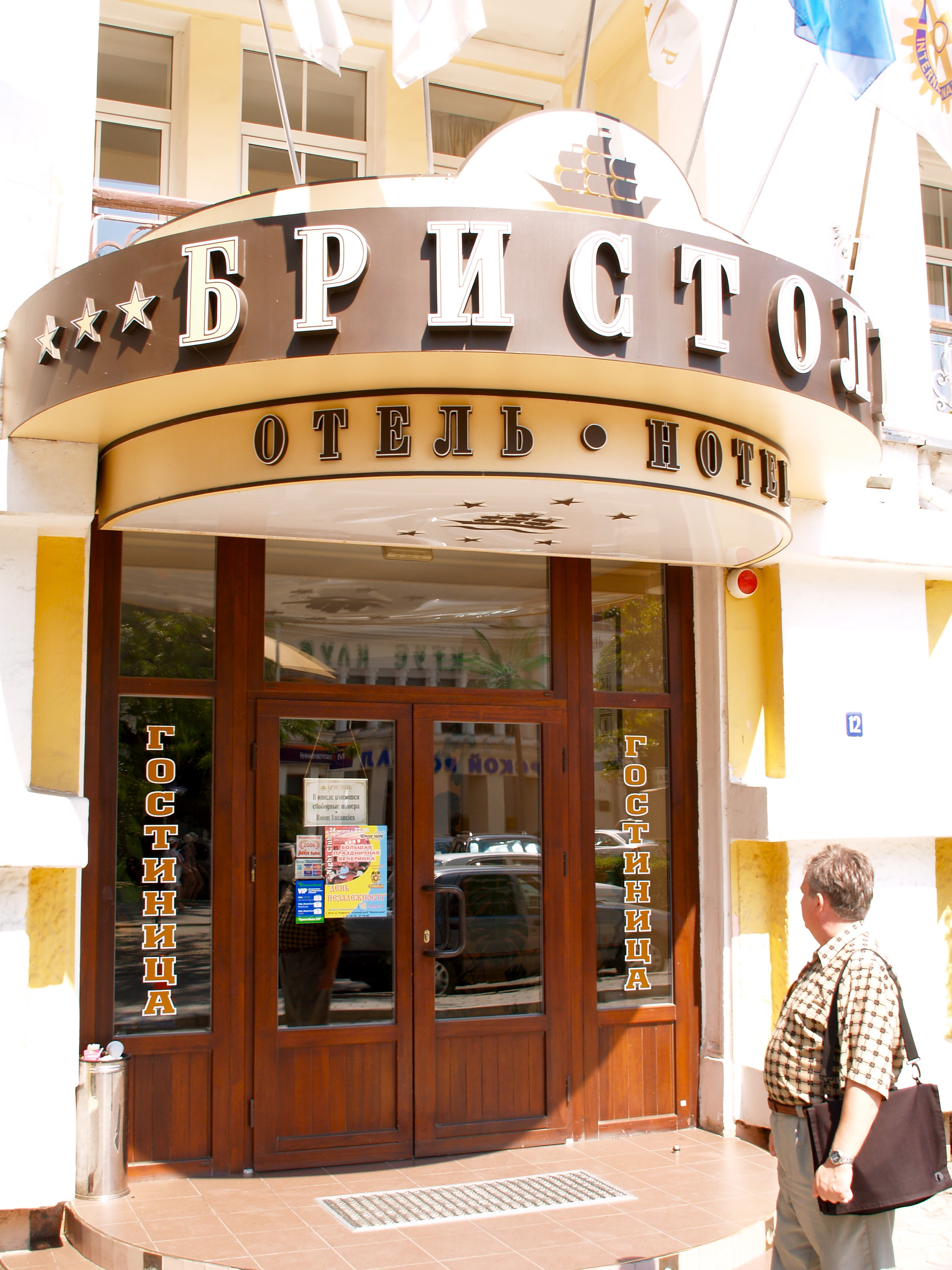 Hotel Bristol in Yalta